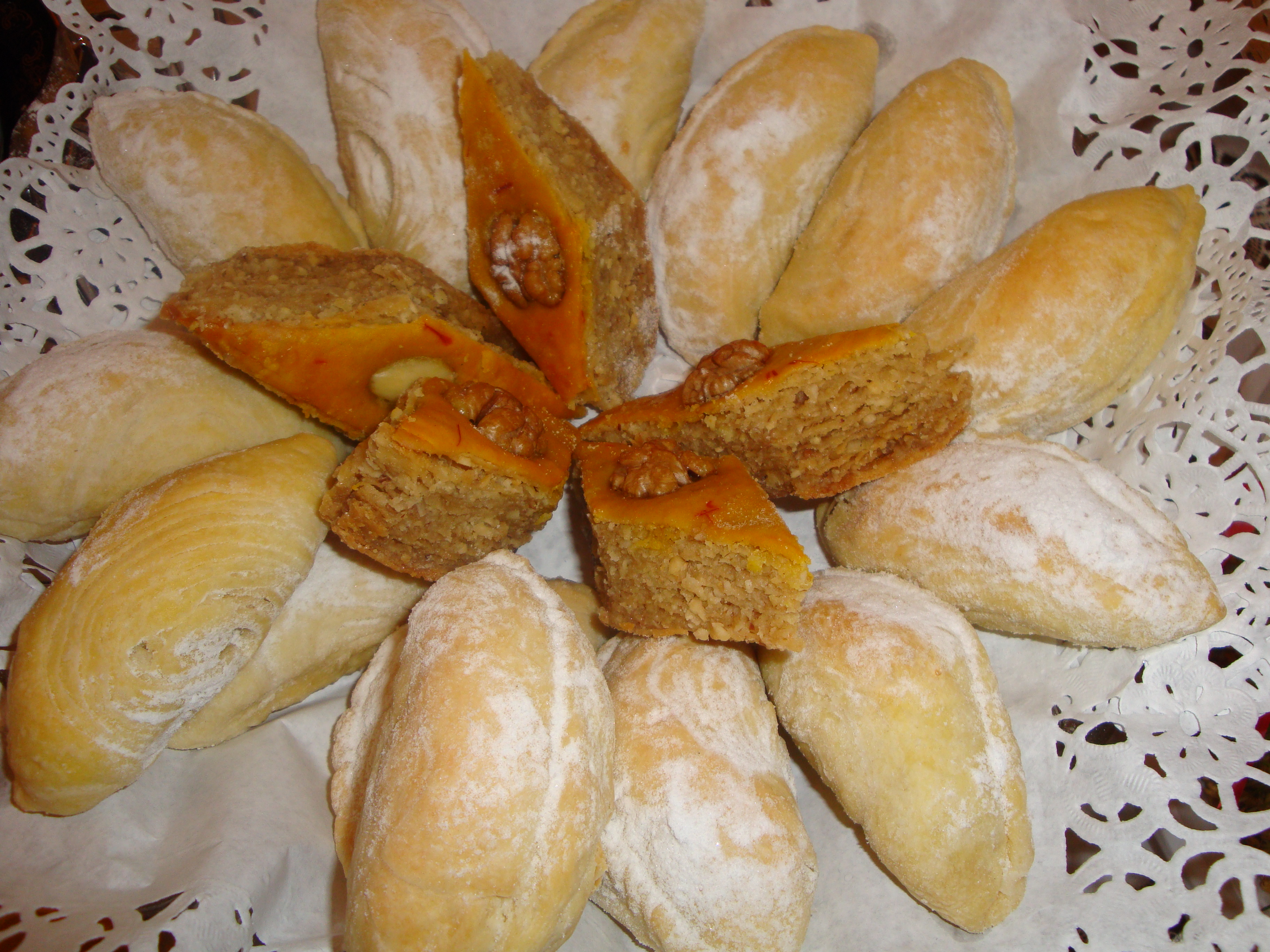 Azərbaycan qatlı şəkərbura və paxlavası (fərdi evdə bişirilmiş)